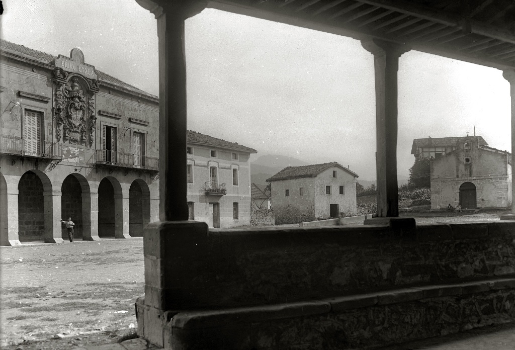 Título original: Ayuntamiento de Urnieta (1/1) Localización: Urnieta (Guipúzcoa)